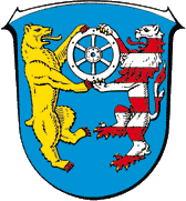 Wappen von Stadtallendorf